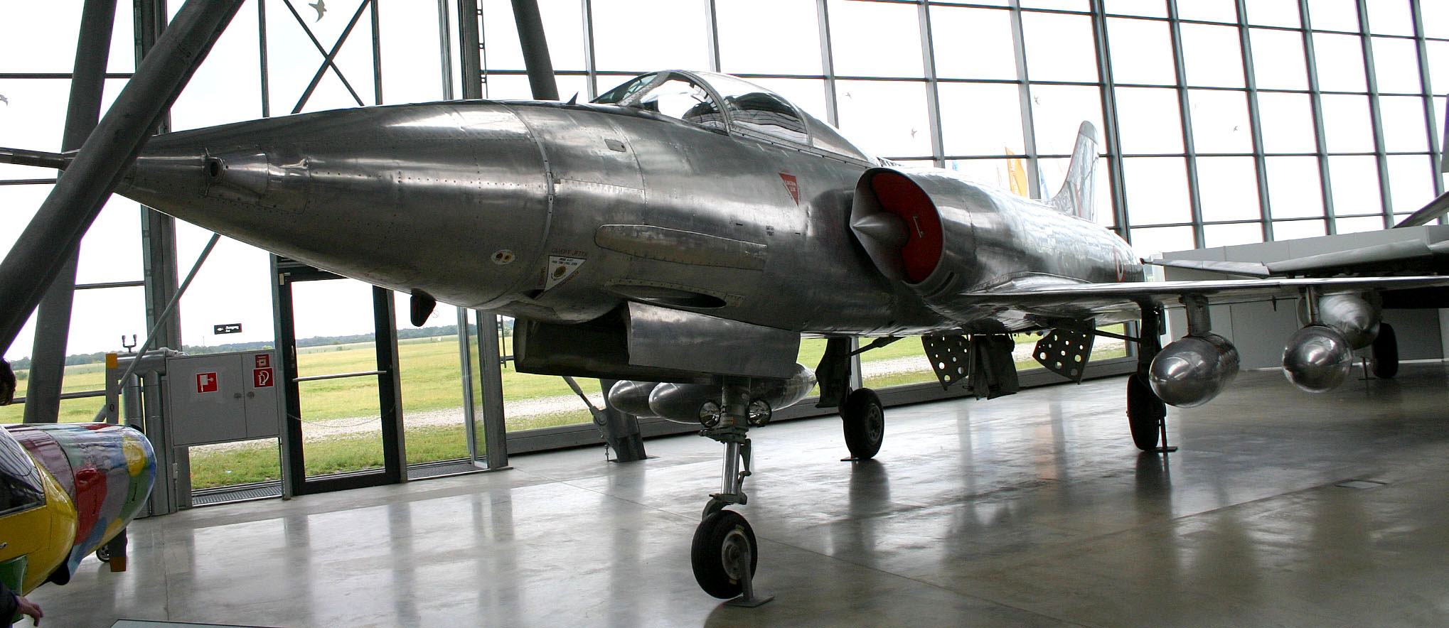 HAL HF 24 in der Flugwerft Oberschleissheim